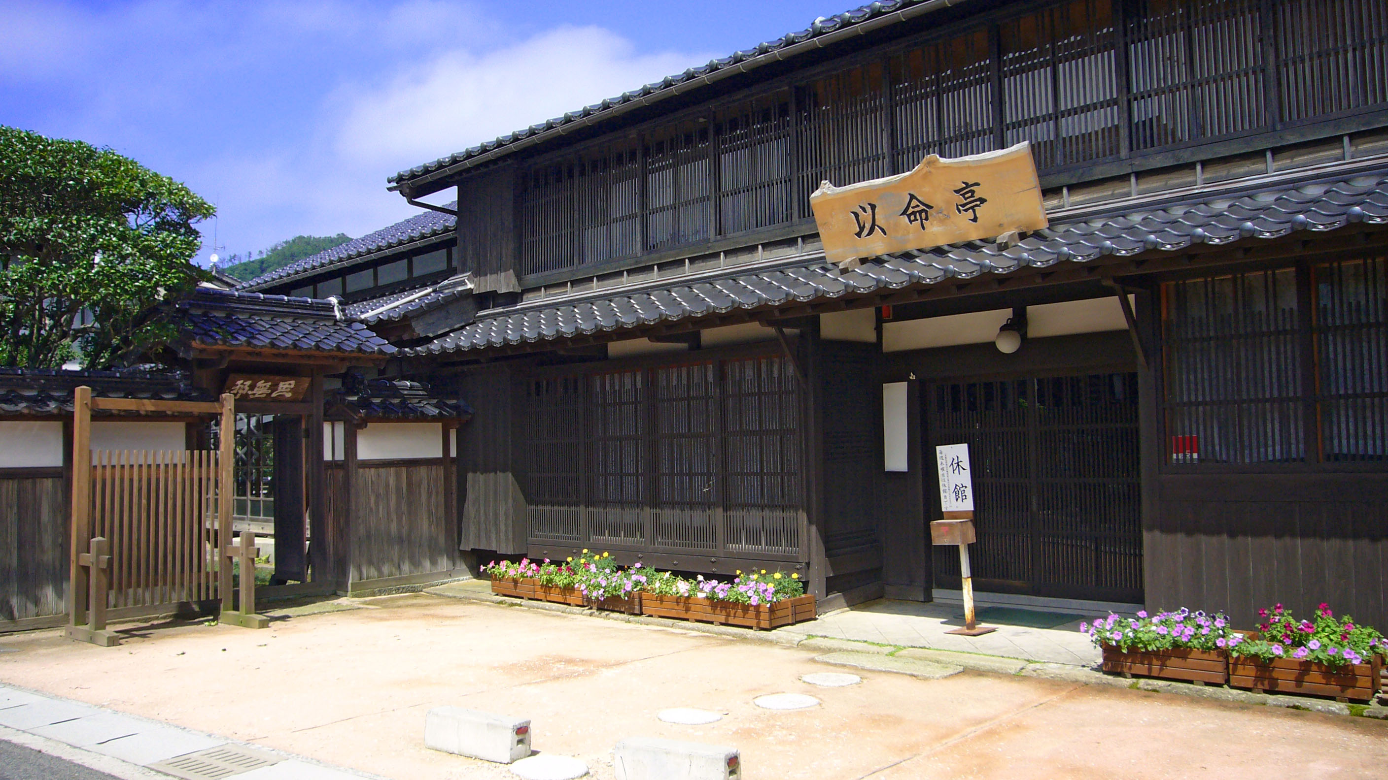 Imeitei in Shinonsen, Hyogo, Japan